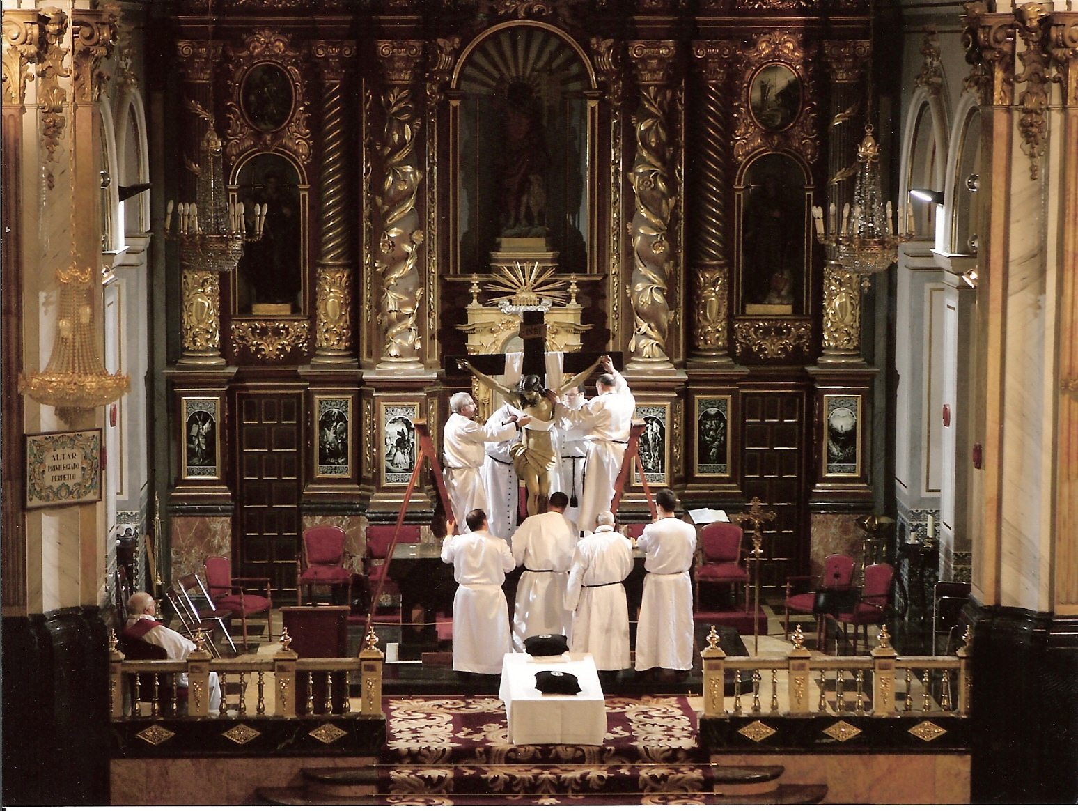 Acto del Descendimiento que se realizo en la tarde del Viernes Santo de 2009 en la Iglesia Parroquial de San Juan Bautista de Manises, por los hermanos de la Virgen de la Soledad.